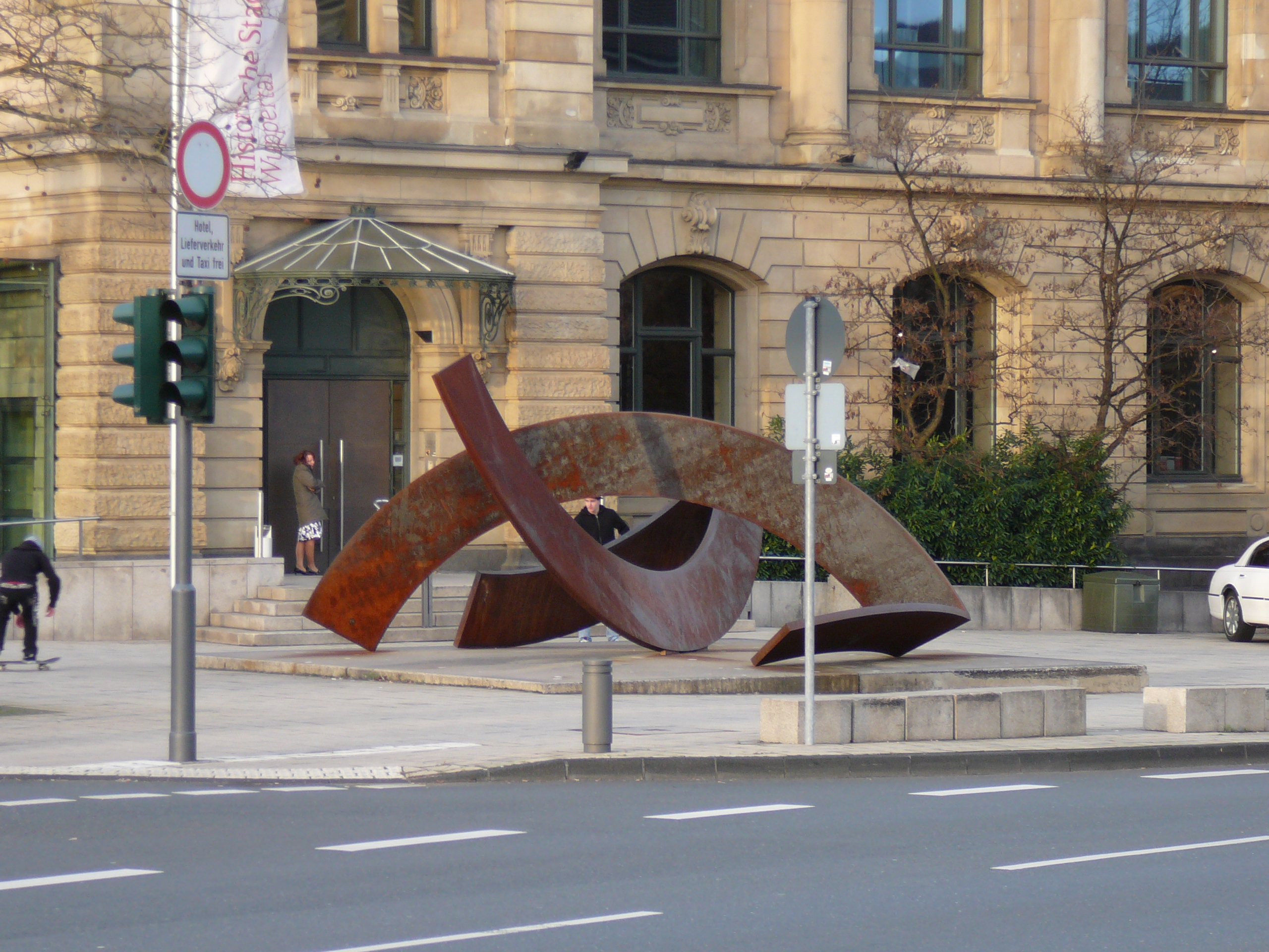 Johannisberg, Wuppertal / sculpture Raumsegmente Rondo (1999) by Alf Lechner/Germany